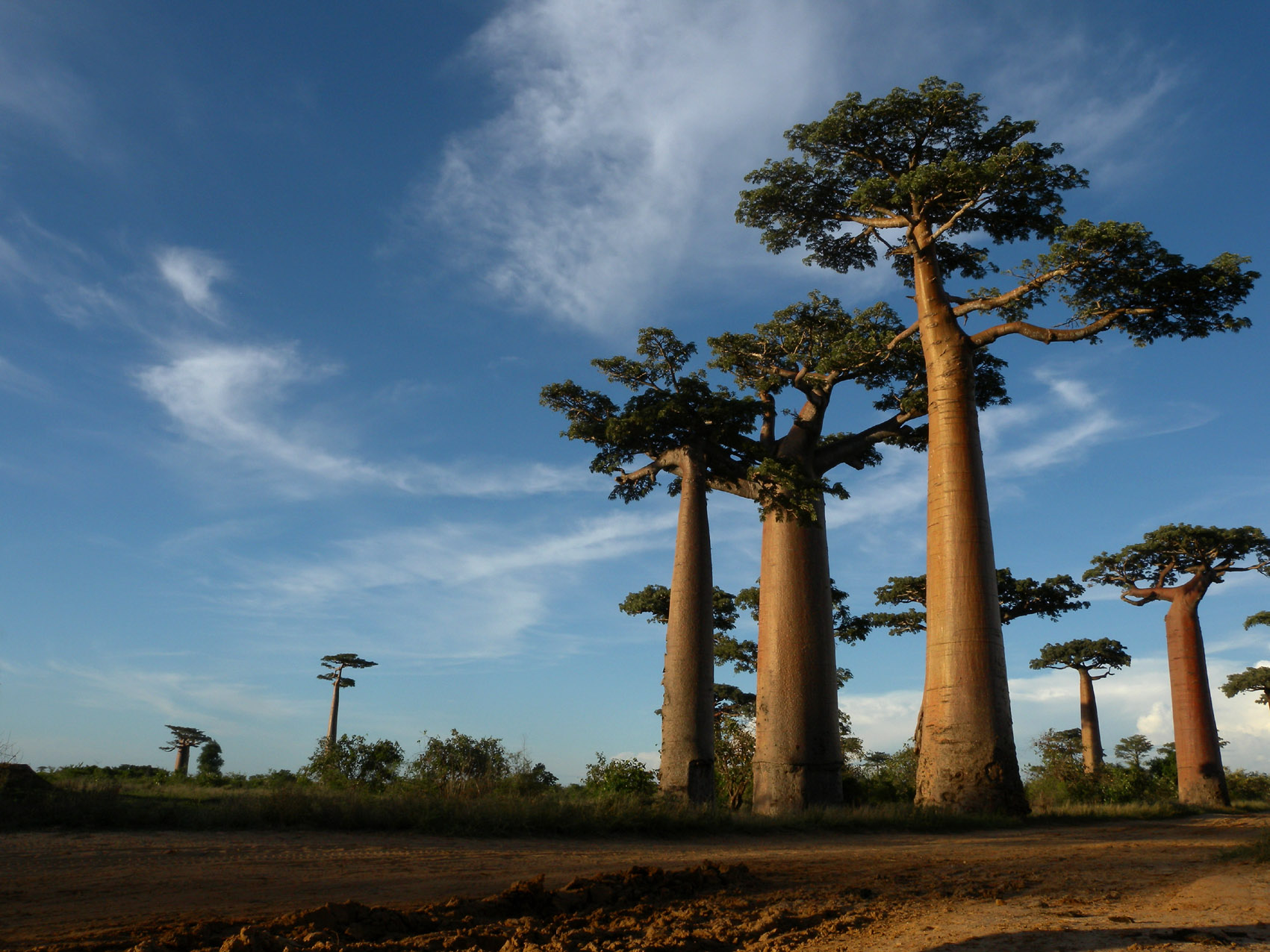 Allée des Baobabs near Morondava, Madagascar